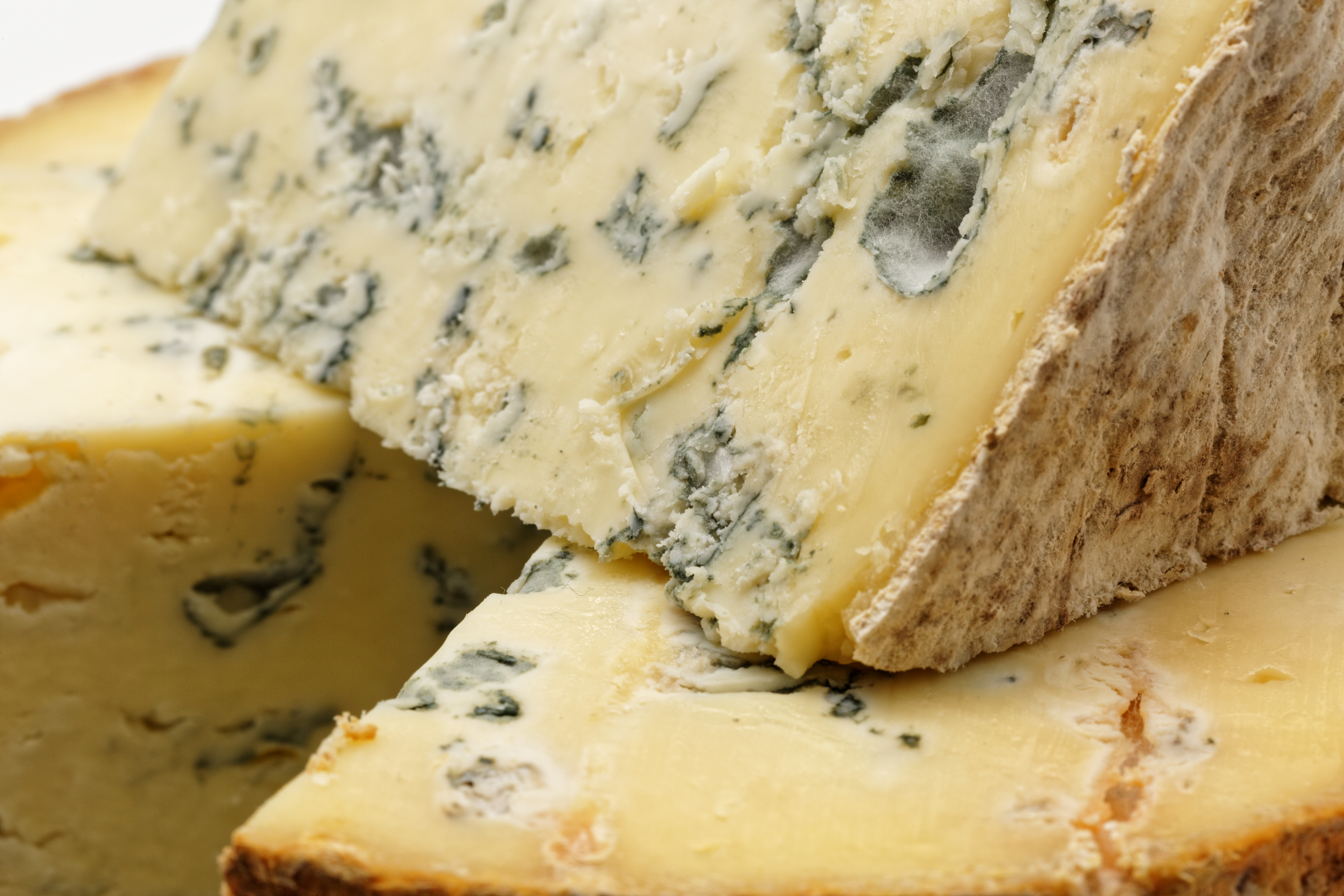 La fourme de Montbrison est un fromage de lait de vache, à pâte persillée.